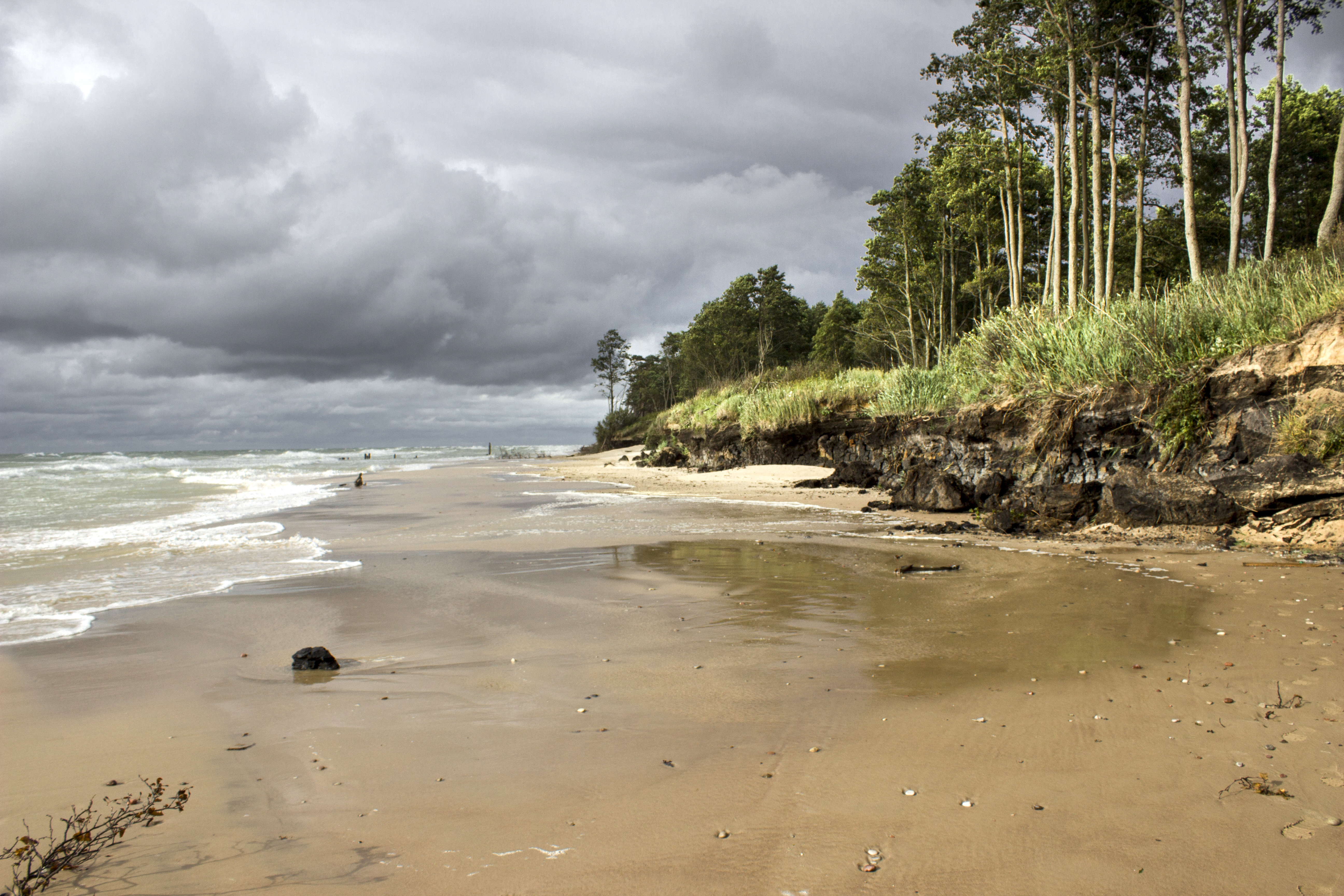 Staldzene, Baltic sea